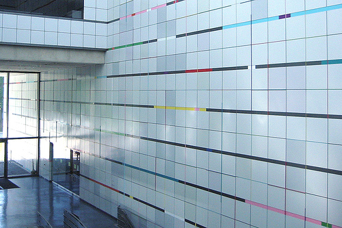 MIT Media Lab entrance